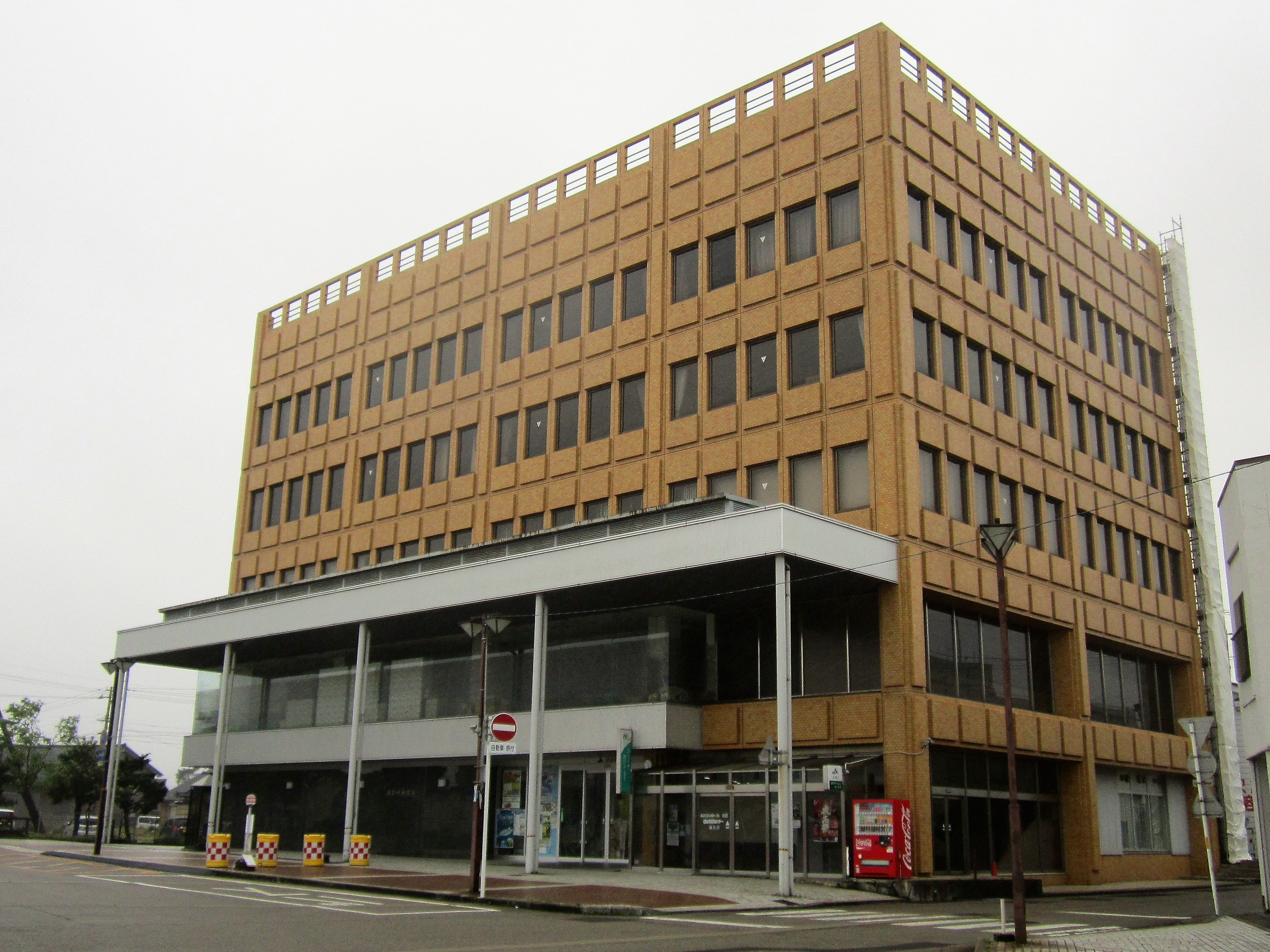 福光農業協同組合 本所（福光中央会館、南砺市荒木） Canon PowerShot A2200